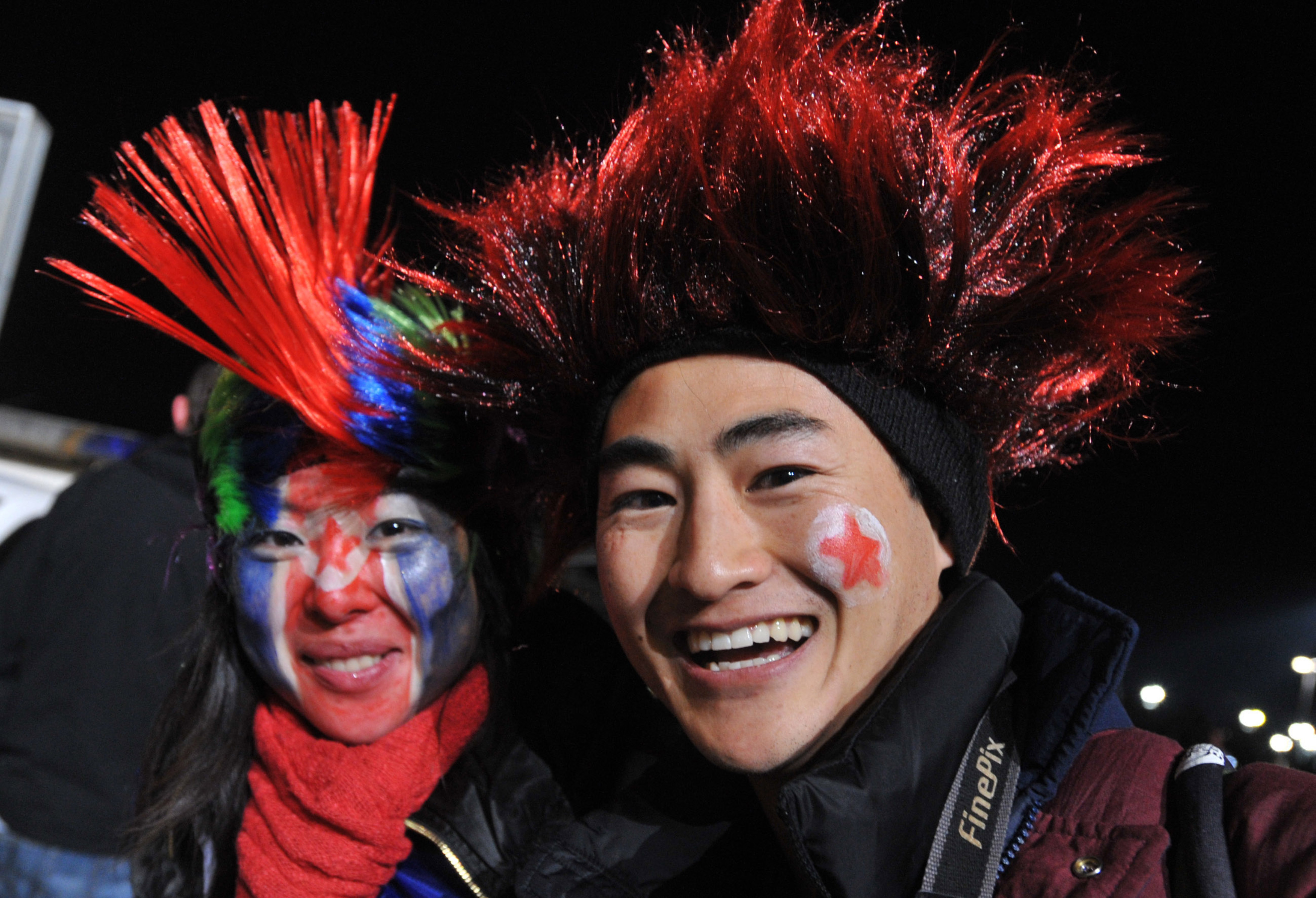 Joanesburgo - Torcida brasileira comanda a festa na estreia da seleção na Copa do Mundo da África do Sul.